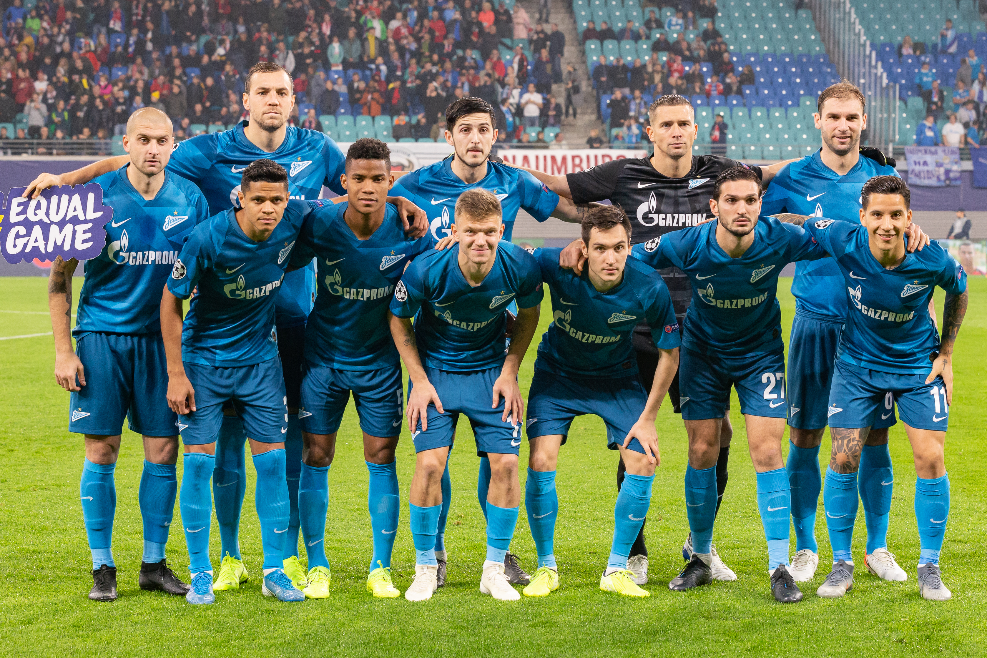 Fußball, Männer, UEFA Champions League, RB Leipzig - FC Zenit St. Petersburg; Mannschaftsfoto, Aufstellung, team photo FC Zenit St. Petersburg